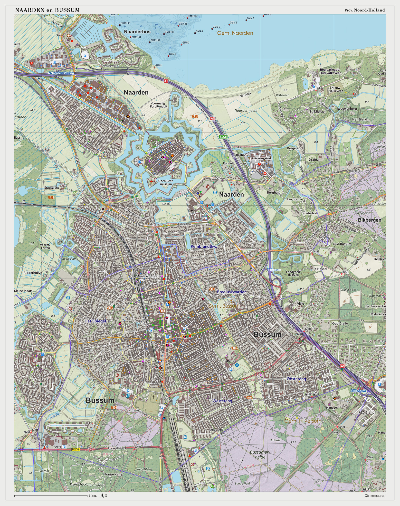 Topografische kaart van Naarden & Bussum (woonplaats). Resolutie: 300 pixels/km. Kaartbeeld samengesteld uit de open geodata van de Top10NL en Top25namen (Basisregistratie Topografie, Kadaster), Creative Commons BY licentie. Gebouwvlakken uit open geodata BAG extract. Wegen uit de OpenStreetMap. Reliëfschaduw uit de Actuele Hoogtekaart AHN2. Samenstelling en kleurenschema: Jan-Willem van Aalst, met QGIS2. Zie ook de Legenda.